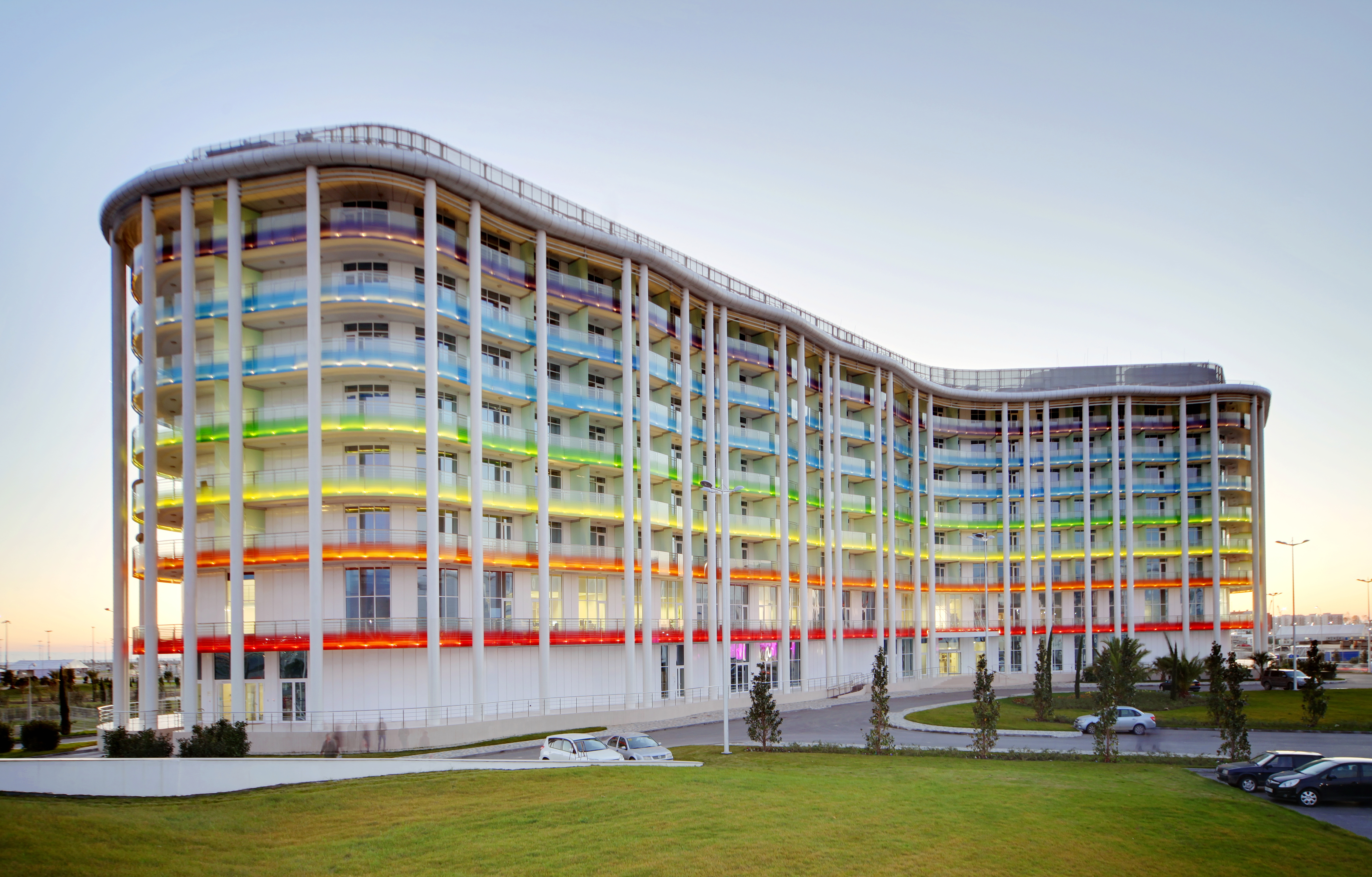 Отель 3 звезды в Олимпийском парке Сочи